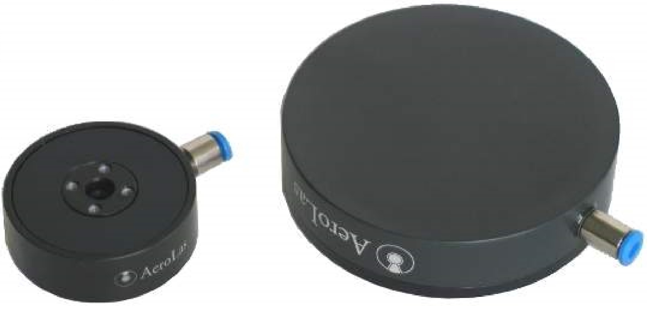 Standard-Luftlager rund